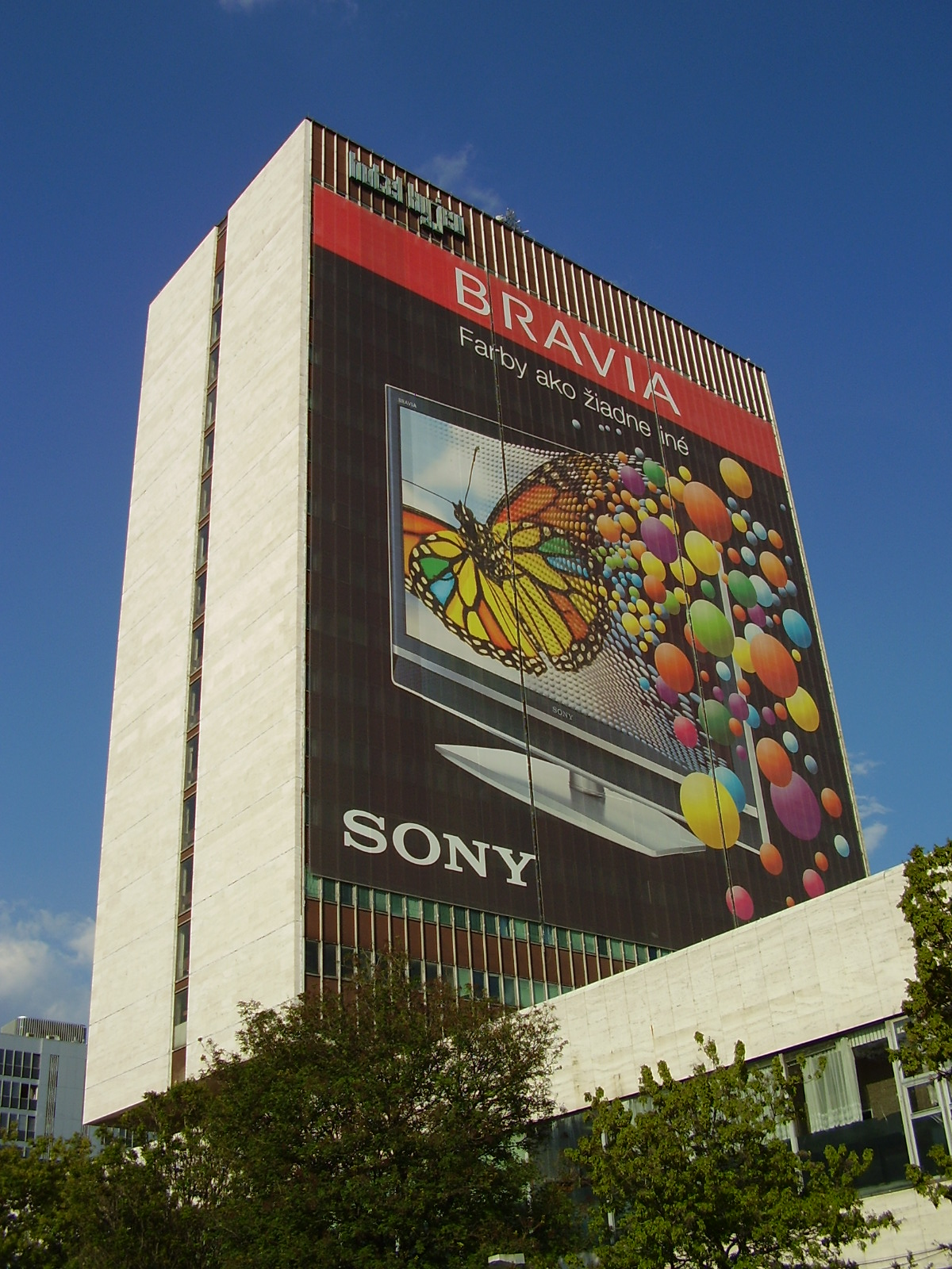 Hotel Kyjev v Bratislavě